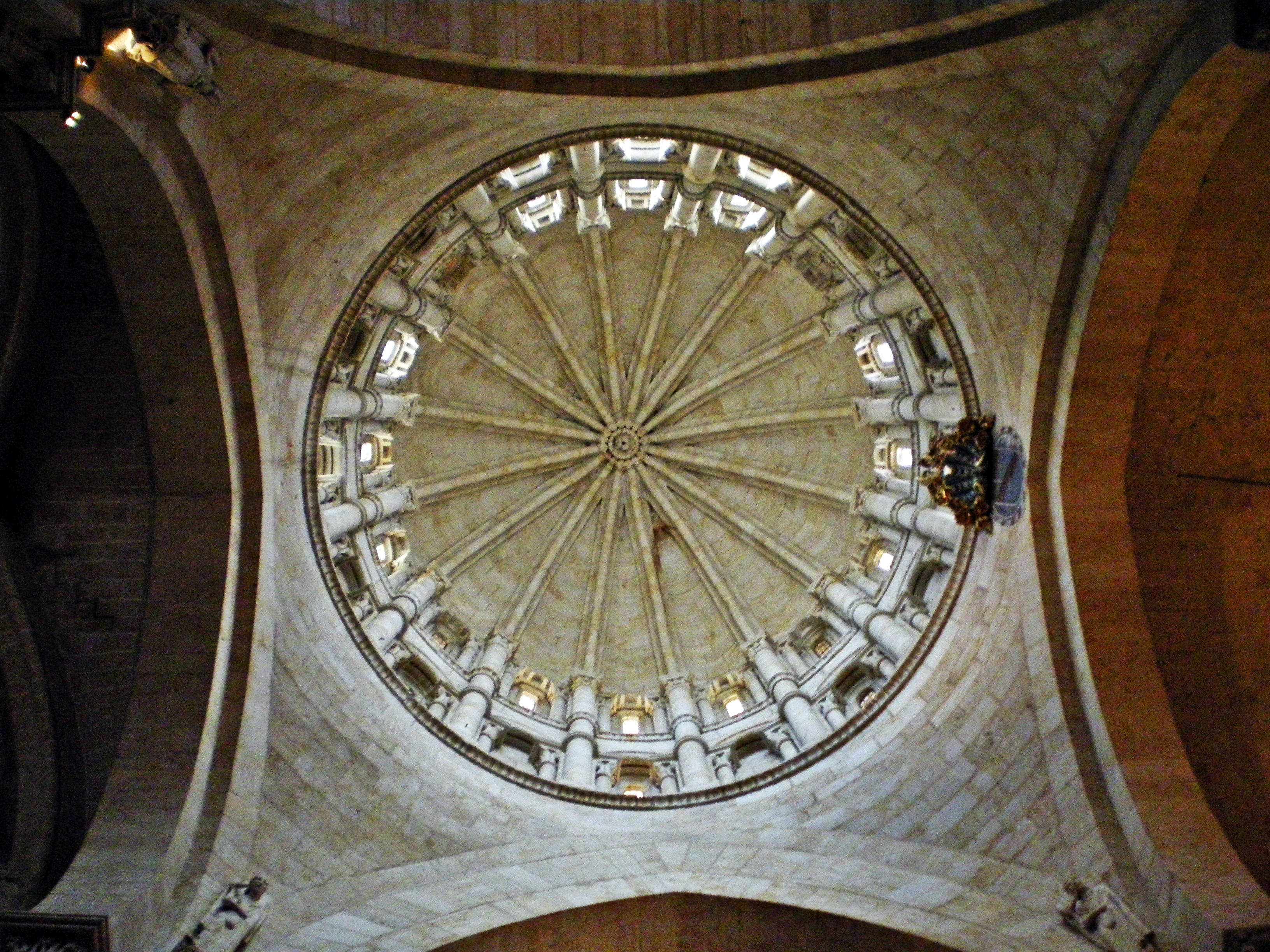 Interior del cimborrio (Torre del Gallo) de la Catedral Vieja de Salamanca